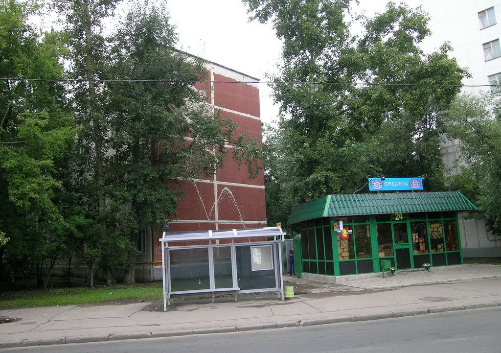 Ангарская улица до реконструкции.